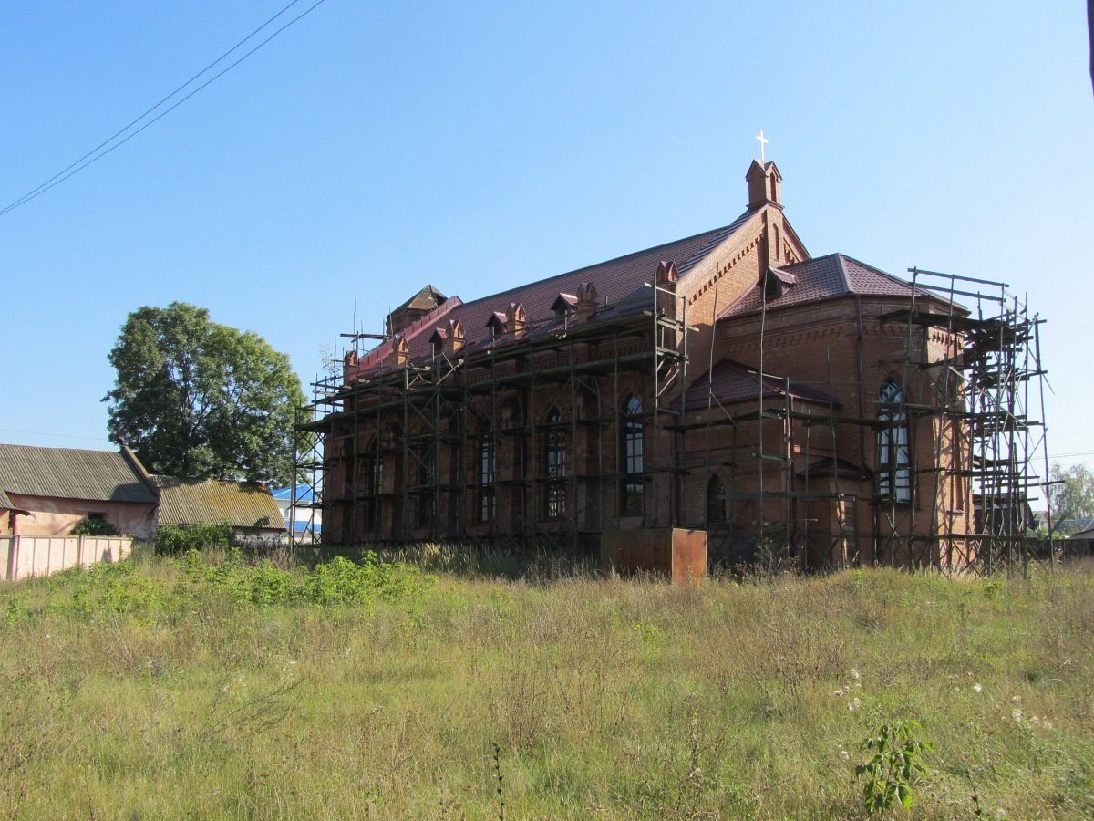 Рагачоў. Касцёл